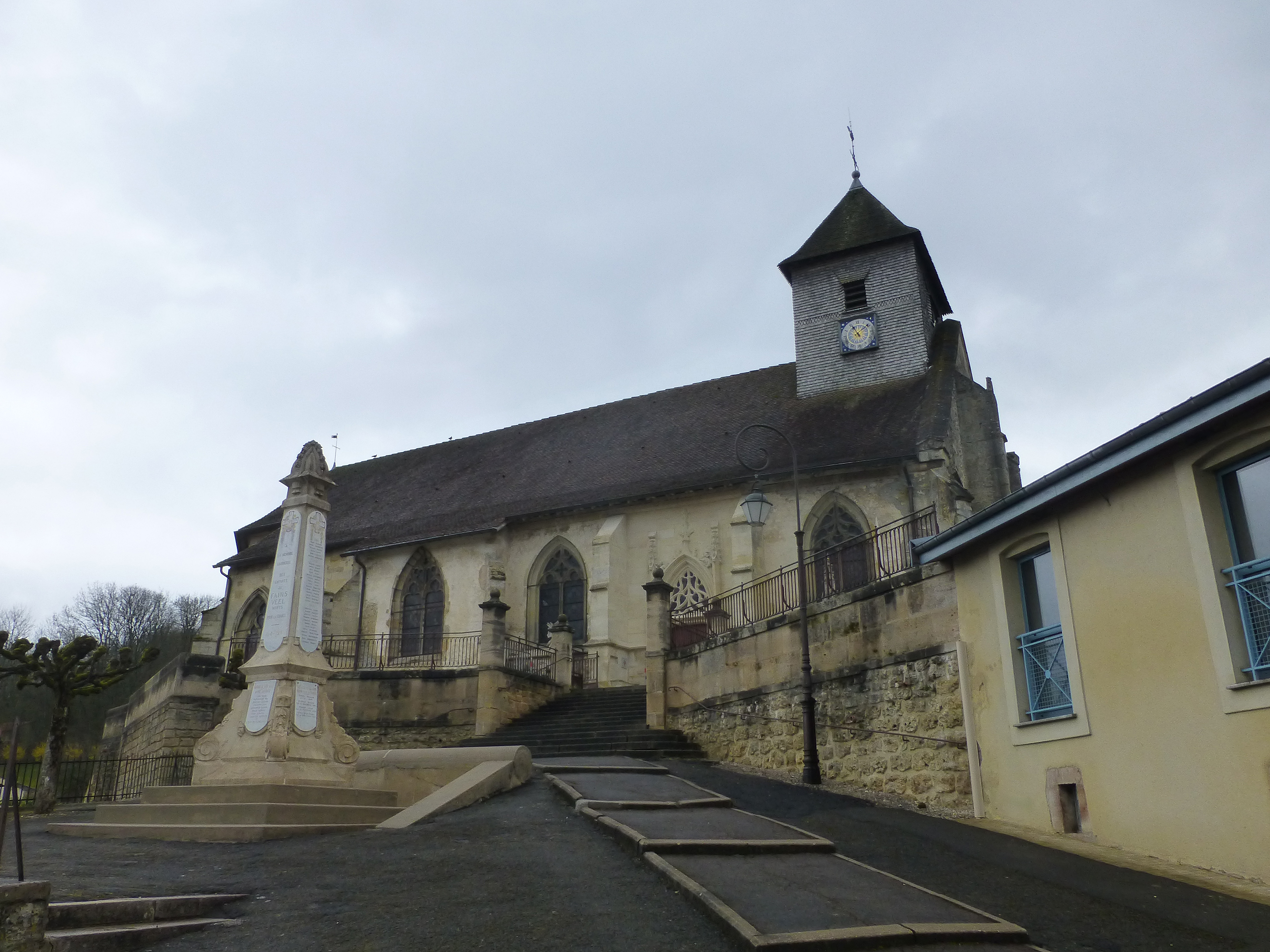 Église Sainte-Catherine (MH) de Fains-les-Sources à Fains-Véel (55)